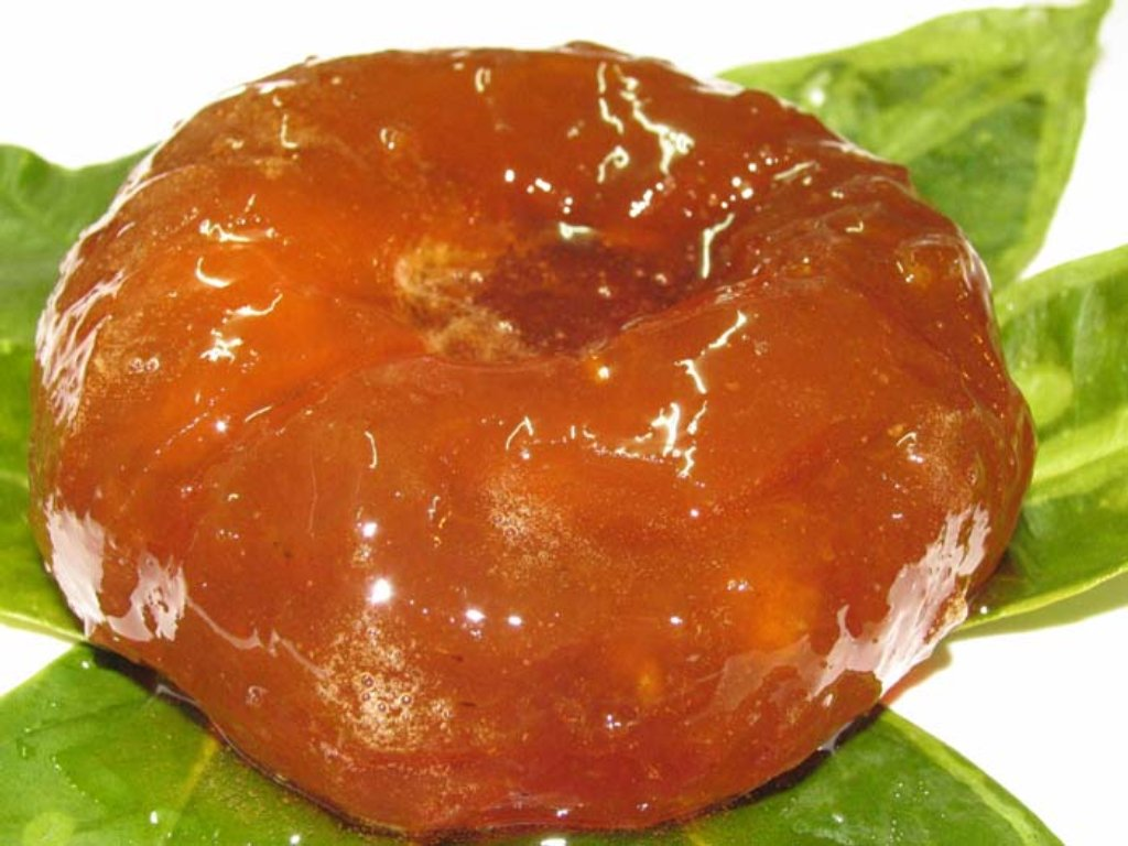 Pompia. Il frutto candito chiamato "Pompia Intrea", cioè Pompia intera